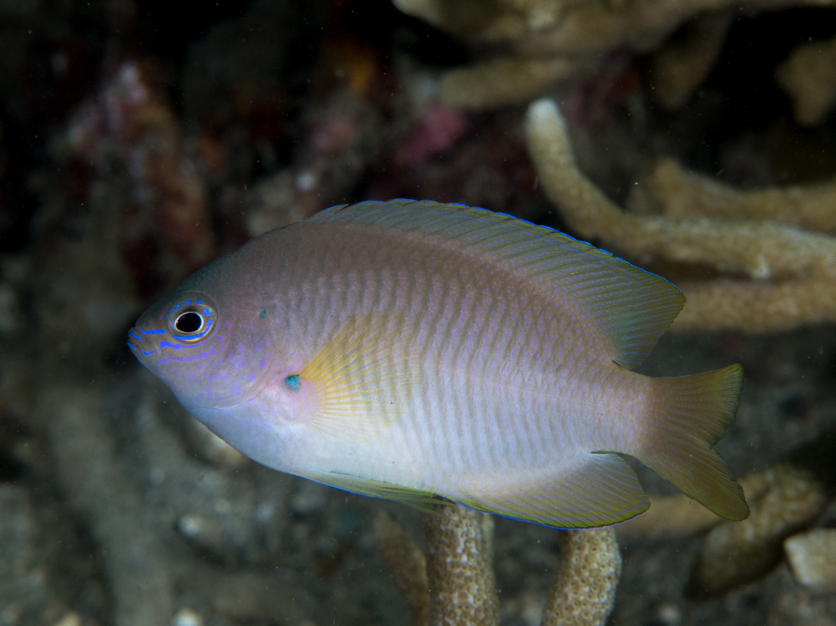 Lembeh, Indonesia - Ambon damsel juvenile (Pomacentrus amboinensis)